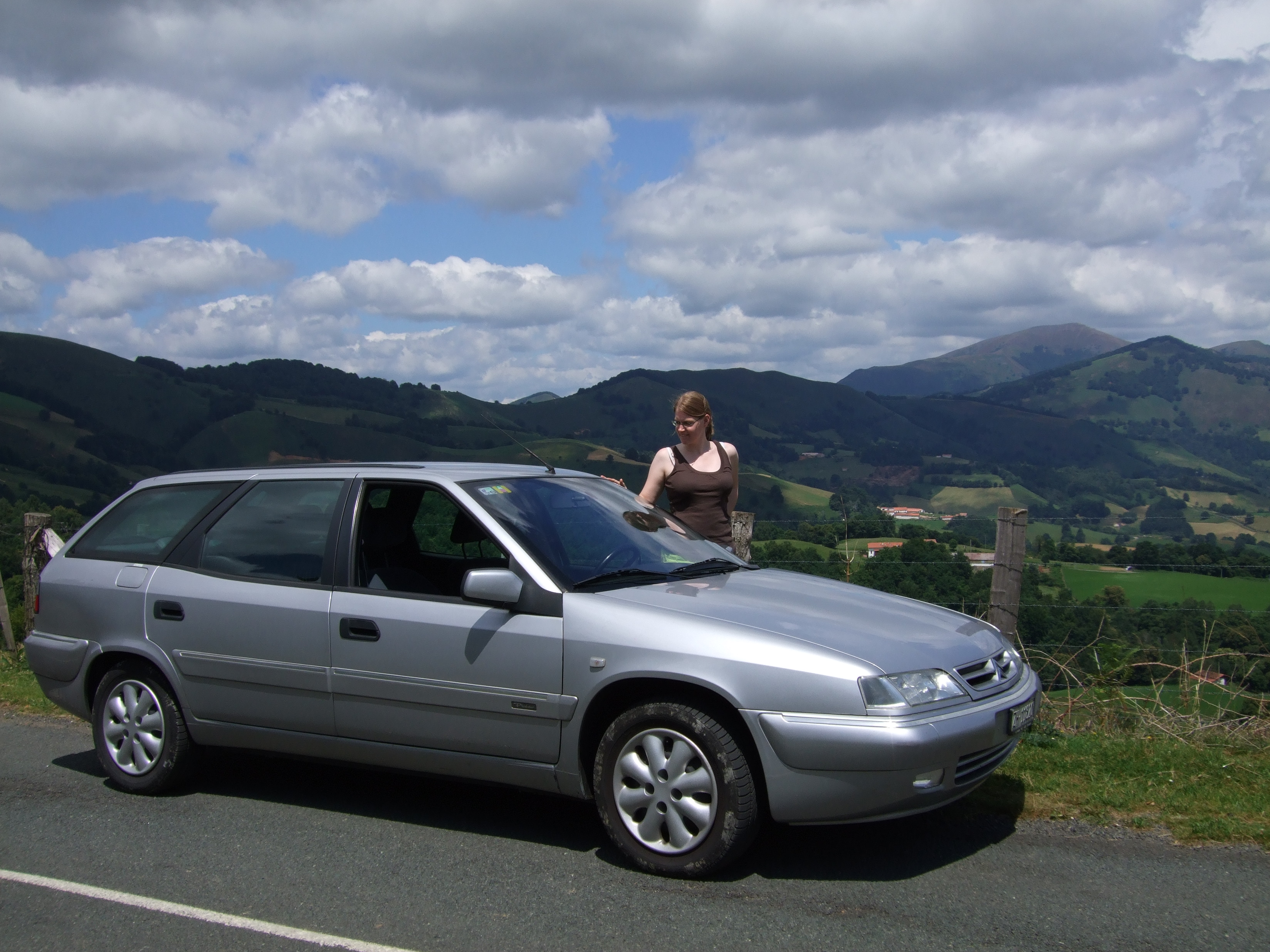 Citroën Xantia Break Serie II